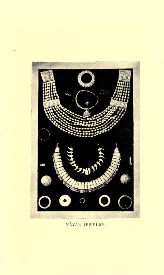 നായർ സ്ത്രീകൾ ധരിച്ചിരുന്ന ആഭരണങ്ങൾ. 1909-നു മുൻപെടുത്ത ചിത്രം. എഡ്ഗാർ തർസ്റ്റൺറ്റെ ദക്ഷിണേന്ത്യയിലെ ജാതികളും വർഗ്ഗങ്ങളും എന്ന പുസ്തകത്തിലെ ചിത്രം.